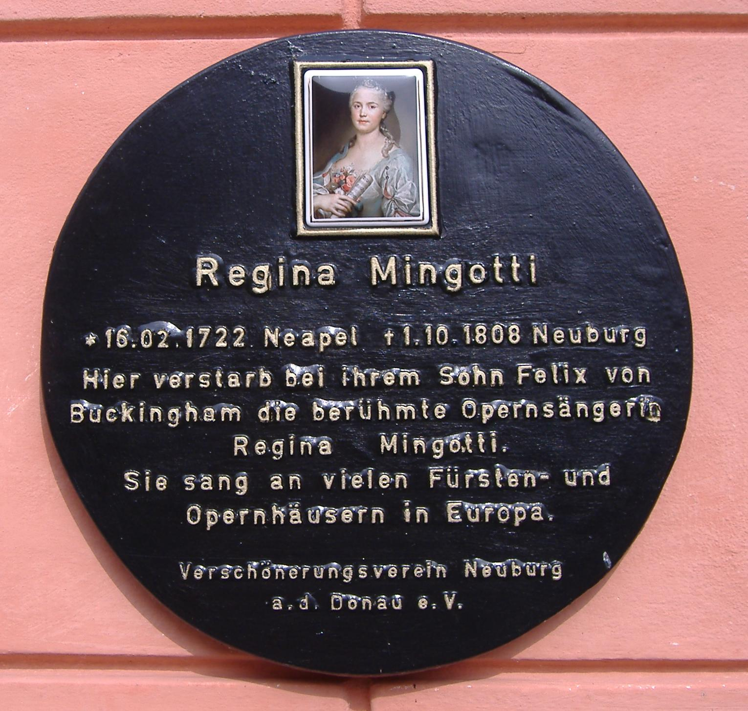 Infotafel am Haus, in dem die Sängerin Regina Mingotti starb